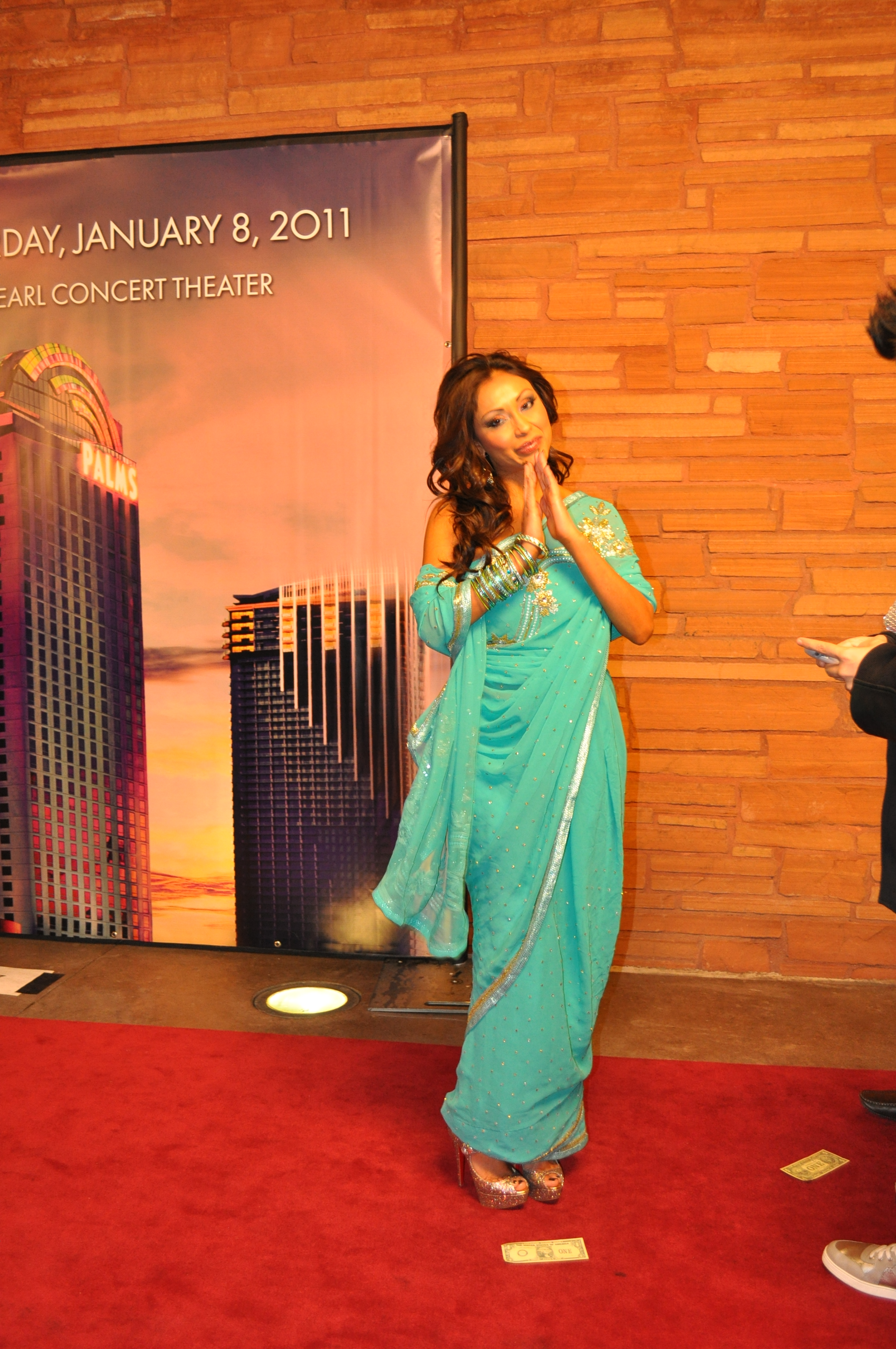 Порнографската актриса Priya Rai на наградите на AVN през 2011 г.